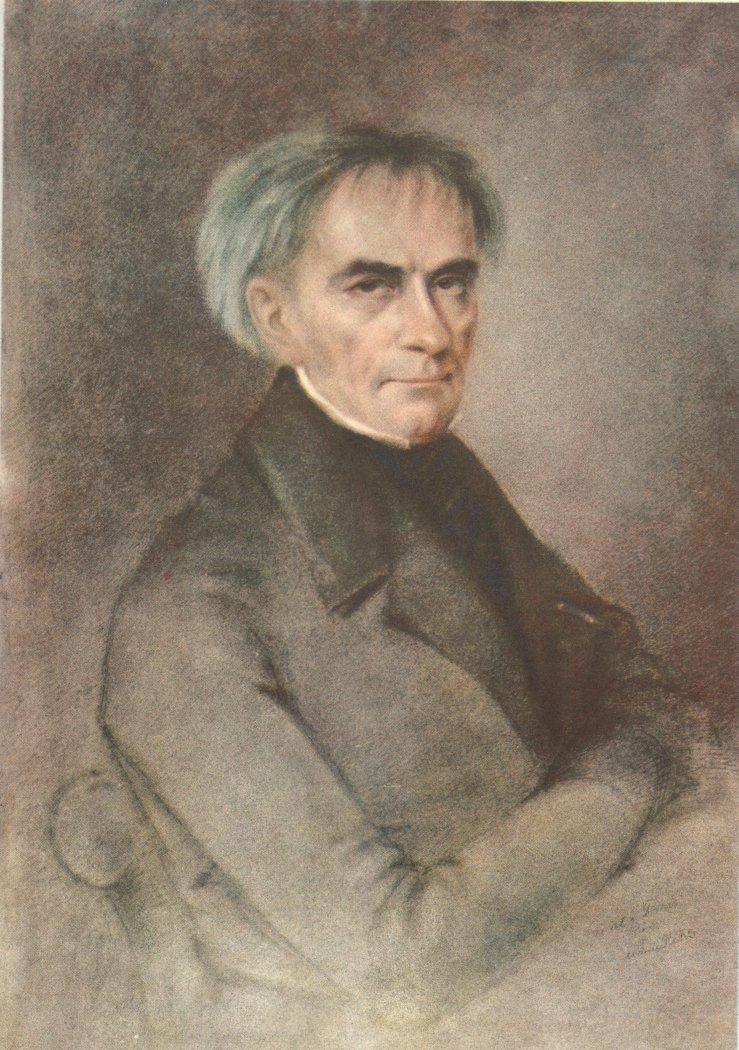 Carl Adolph Agardh (1785-1859)